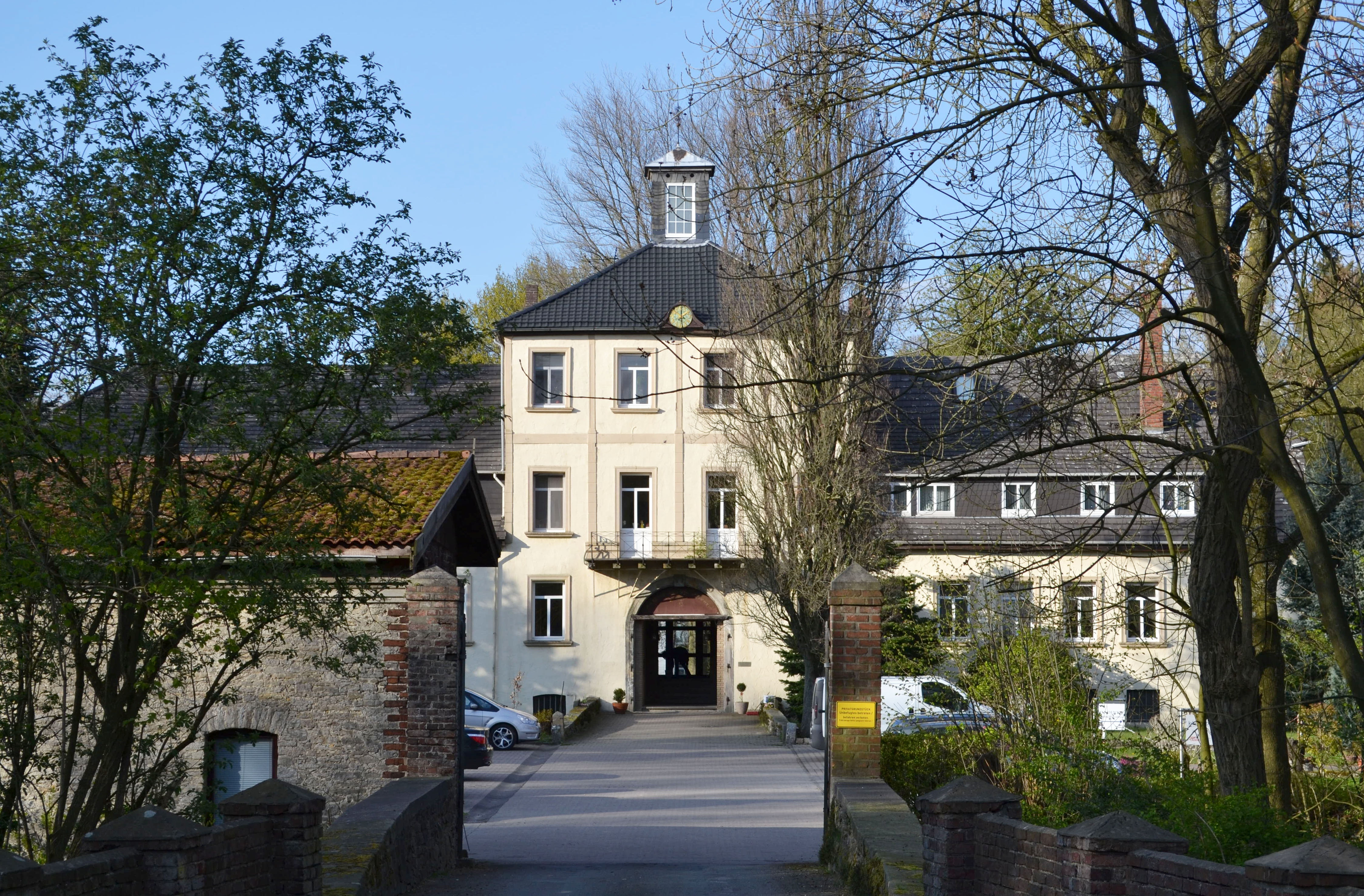 Baudenkmal Detmold Nr. 653 - das Herrenhaus (Fassade und Dachkörper) und der so genannte "Hohe Garten" (Stützmauern und Turmreste mit Grotte) des ehem. Rittergutes Braunenbruch Heidenoldendorfer Straße 51